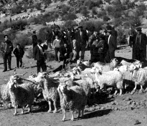 ഒരു അല്‍ബേനിയന്‍ ഗ്രാമത്തിലെ ആടു വിപണി